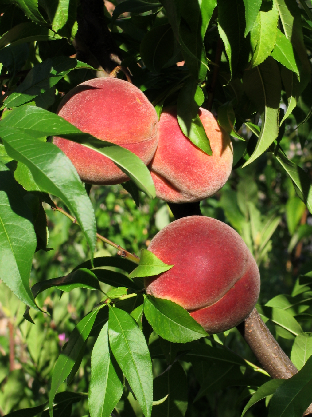 Weinbergpfirsiche - vineyard peaches